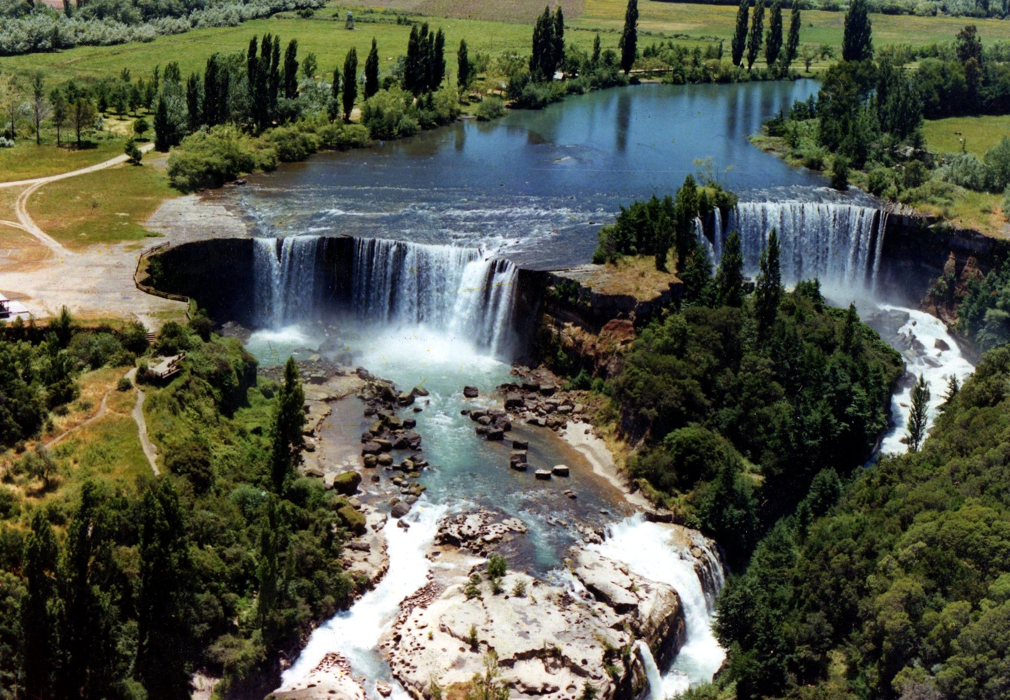 Tomado por Rene Orellano!